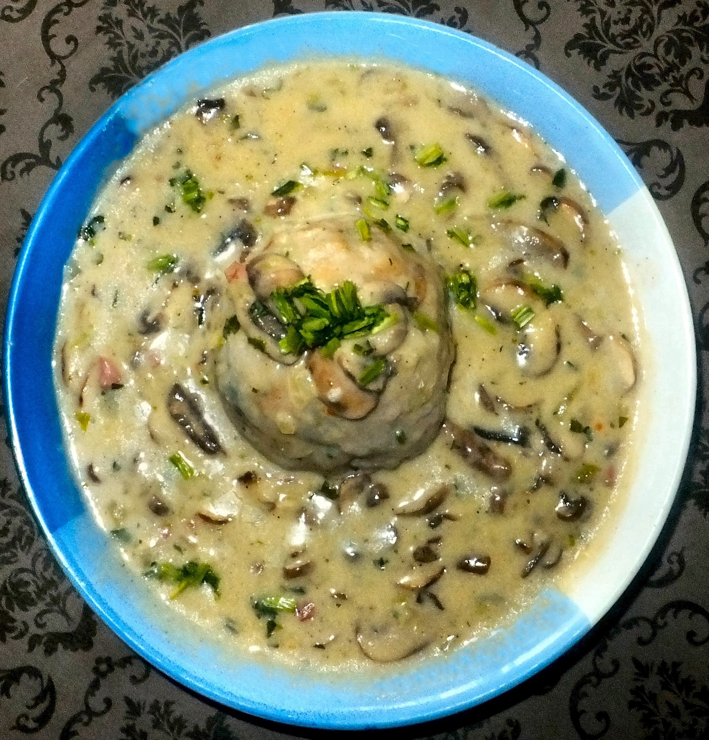 Waldpilze a la creme, hausgem. Tiroler Semmelknödel